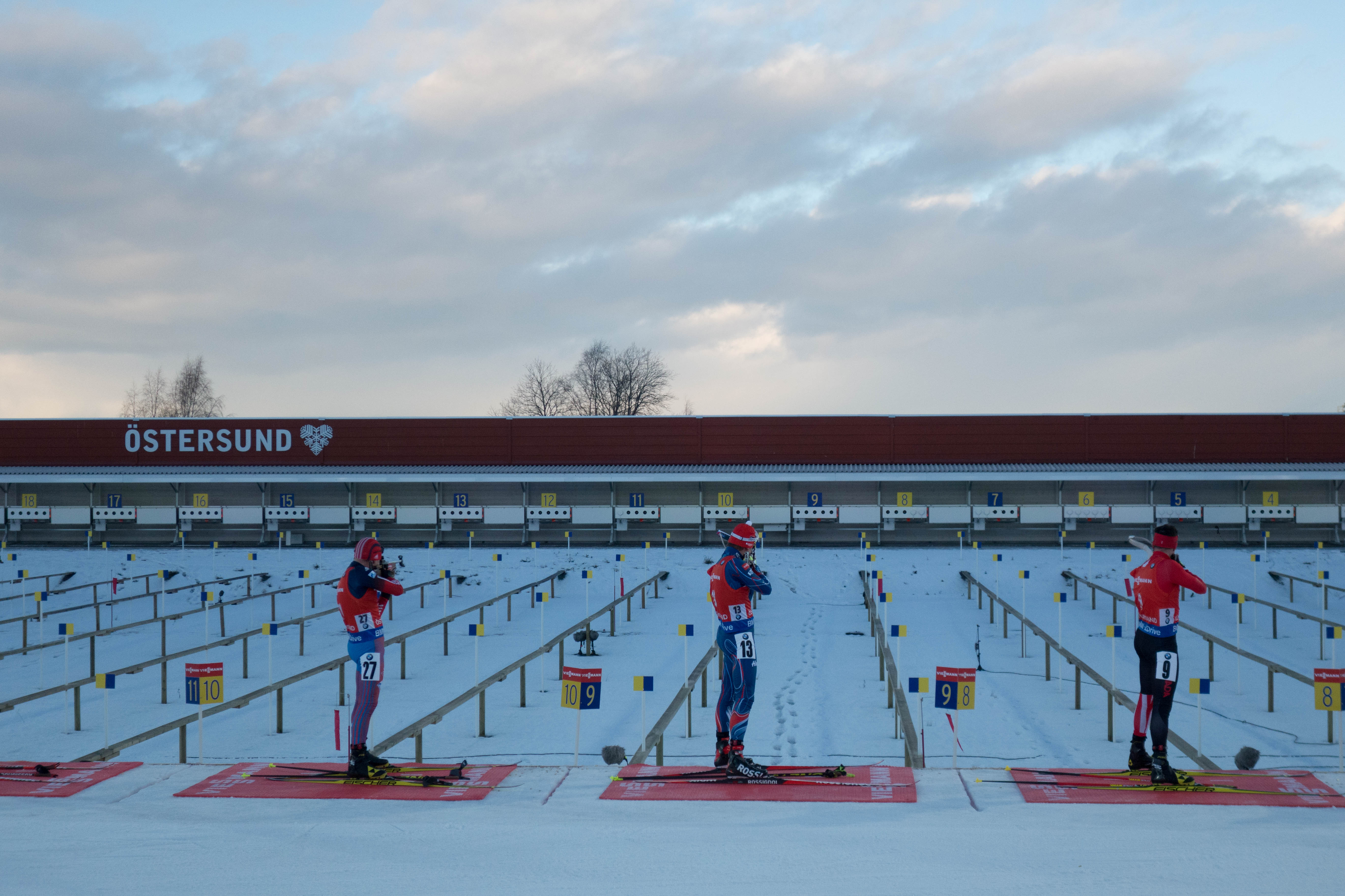 Skytte pågår i Jaktstarten i Världscupen 2015